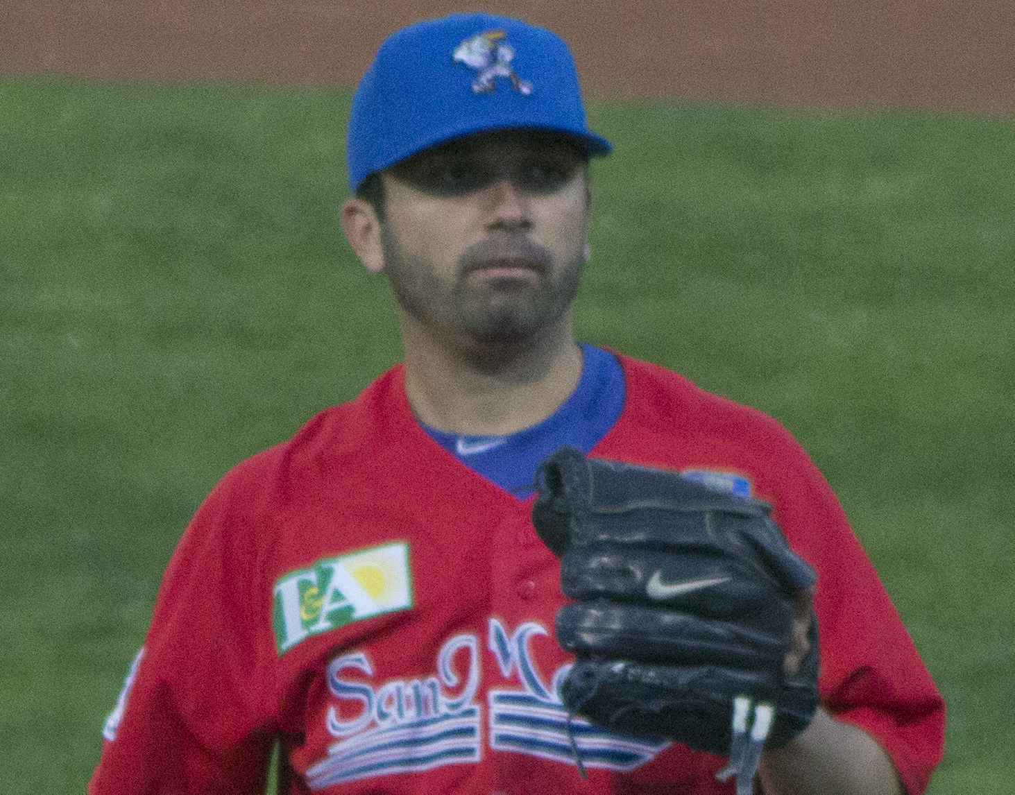 Tiago da Silva, lanciatore della T&A San Marino, durante San Marino-Rimini, gara valida per l'Italian Baseball League 2013. Foto scattata da me dagli spalti con obiettivo 70-300.